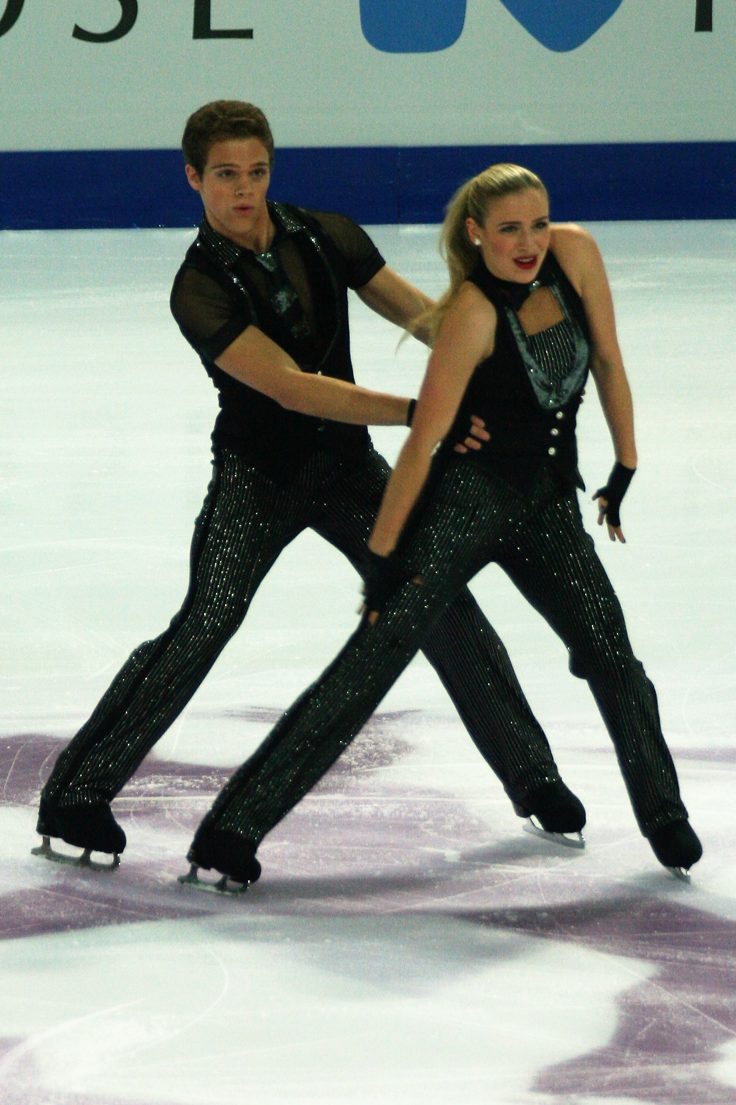 Рэйчел Парсонс / Майкл Парсонс (США) на финале Гран-при по фигурному катанию среди юниоров 2016-2017